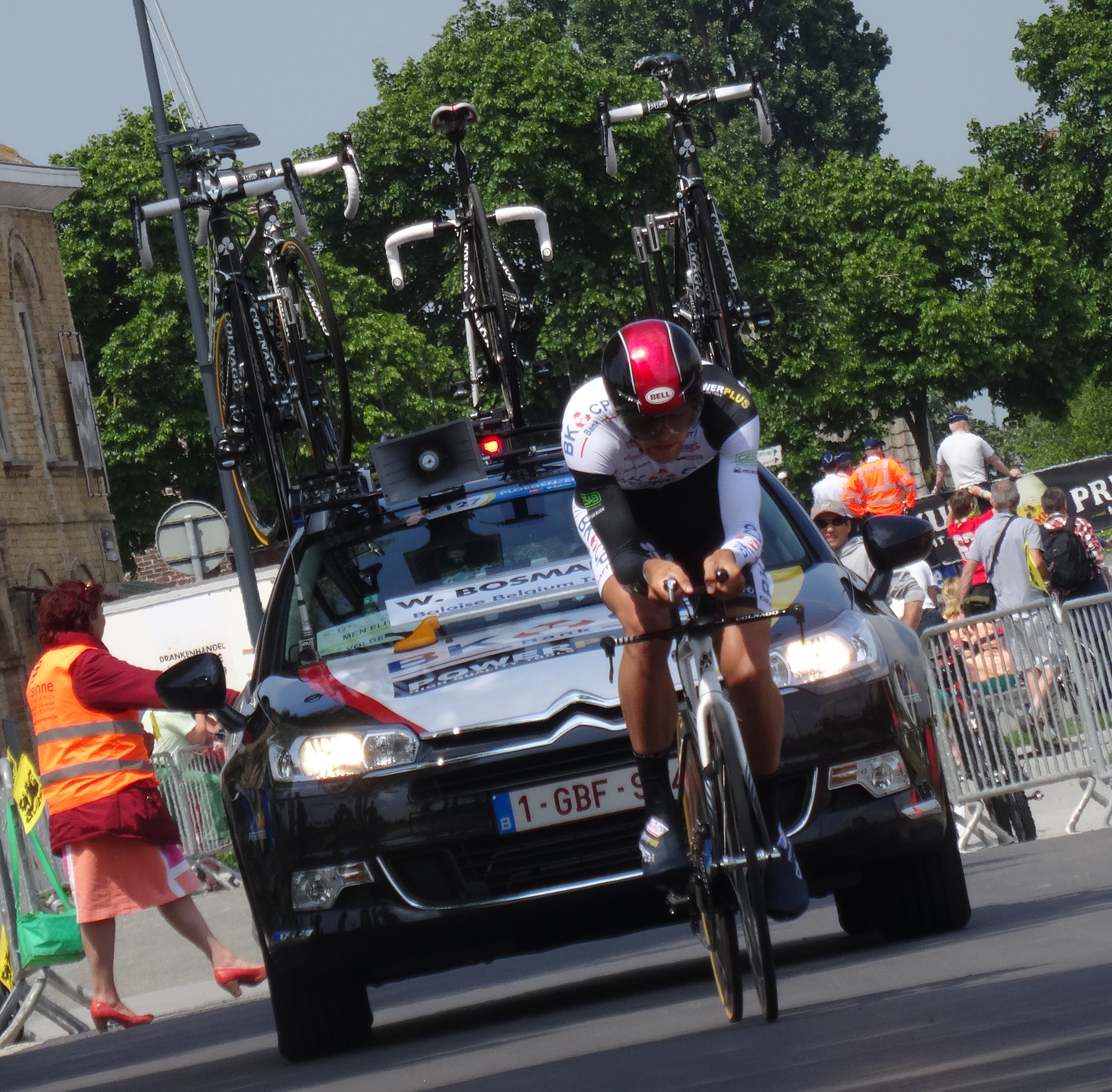 Reportage photographique réalisé le vendredi 30 mai à l'occasion du contre-la-montre individuel de la troisième étape du Tour de Belgique 2014 à Dixmude, Belgique.